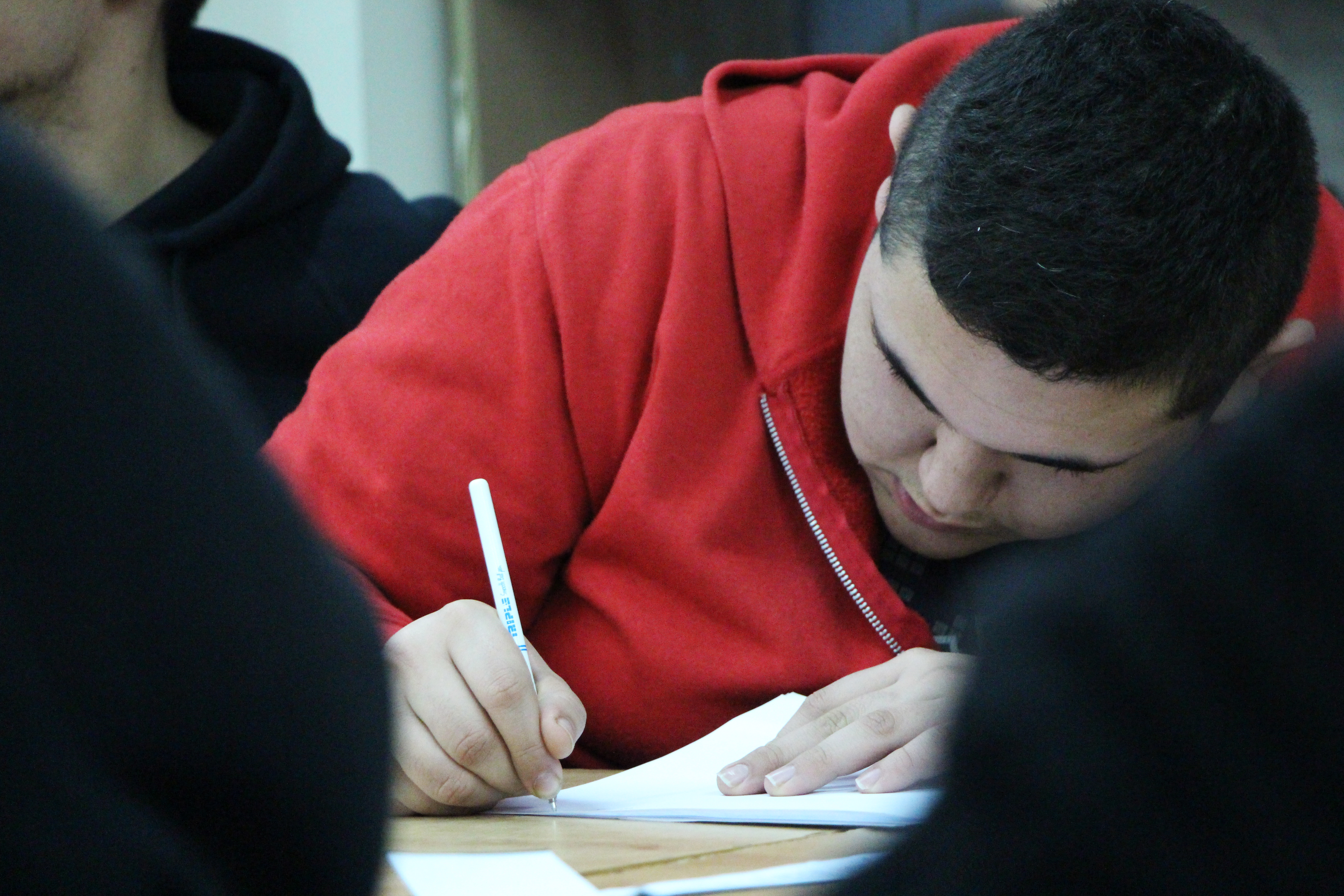 מבחן תיכון רוטברג